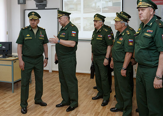 Министр обороны России генерал армии Сергей Шойгу в Военной академии Ракетных войск стратегического назначения имени Петра Великого